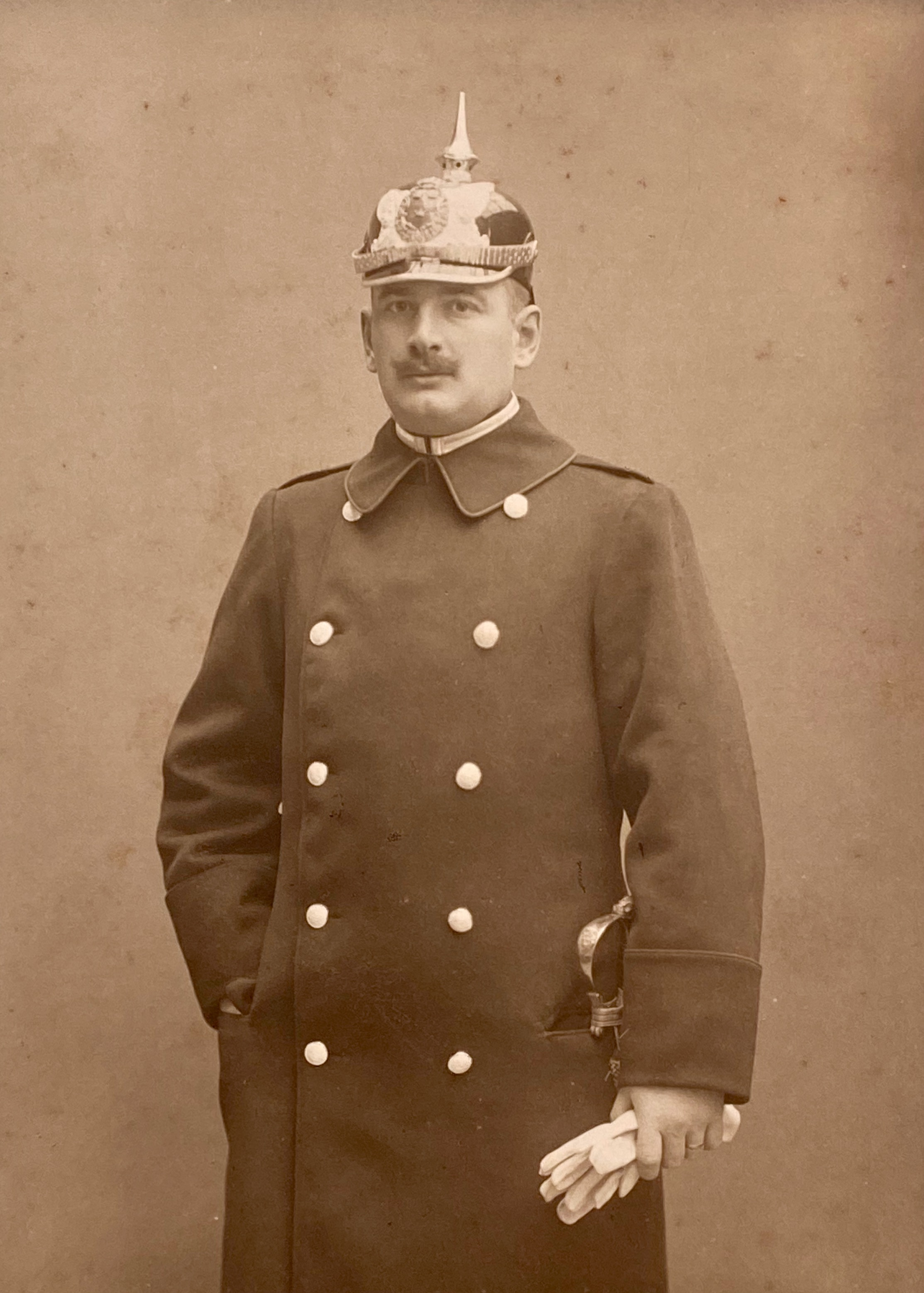 Carl Uggla (1875-1937) år 1905